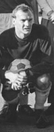 Title: 1. FC Magdeburg, Mannschaftsfoto People in the image: Sparwasser, Jürgen: Fußballnationalspieler, 1. FC Magdeburg, Olympiade 1972, DDR (GND 136159745) Factual corrections and alternative descriptions are encouraged separately from the original description. Additionally errors can be reported at this page to inform the Bundesarchiv. Original historic description: Zentralbild Ritter 30.5.1967 Magdeburg: 1. FC Magdeburg wieder in der Fußball-Oberliga. Die Mannschaft des 1. FC Magdeburg: Vorn vlnr: Walter, [Wolfgang] Seguin, Moldenhauer, [Jürgen] Sparwasser und Segger. Stehend vlnr: [Manfred] Zapf, Fronzeck, Kubisch, Ruhloff, Retschlag, Trainer [Heinz]Krügel, Hirschmann, Abraham, Rautenberg und Behne. Der 1. FC Magdeburg qualifizierte sich am 28.5.1967 für die Fußball-Oberliga. Im letzten und alles entscheidenden Punktspiel (Staffel Nord) mit Post Neubrandenburg reichte ein 1:1 Unentschieden.